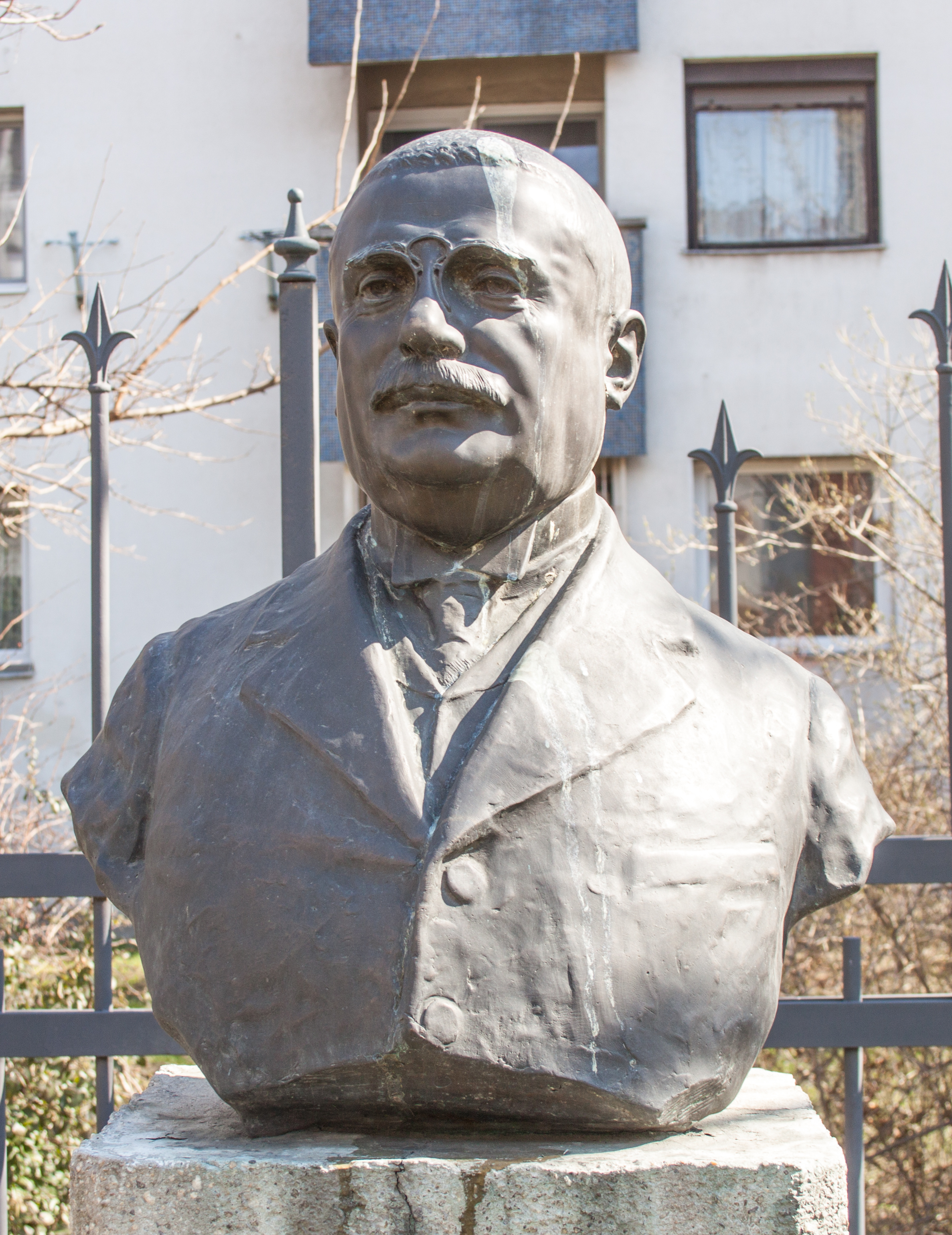 Bust of Samu Zorkóczylabel QS:Len,"Bust of Samu Zorkóczy" label QS:Lhu,"Zorkóczy Samu mellszobra"